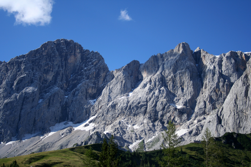 Dachstein Südwand